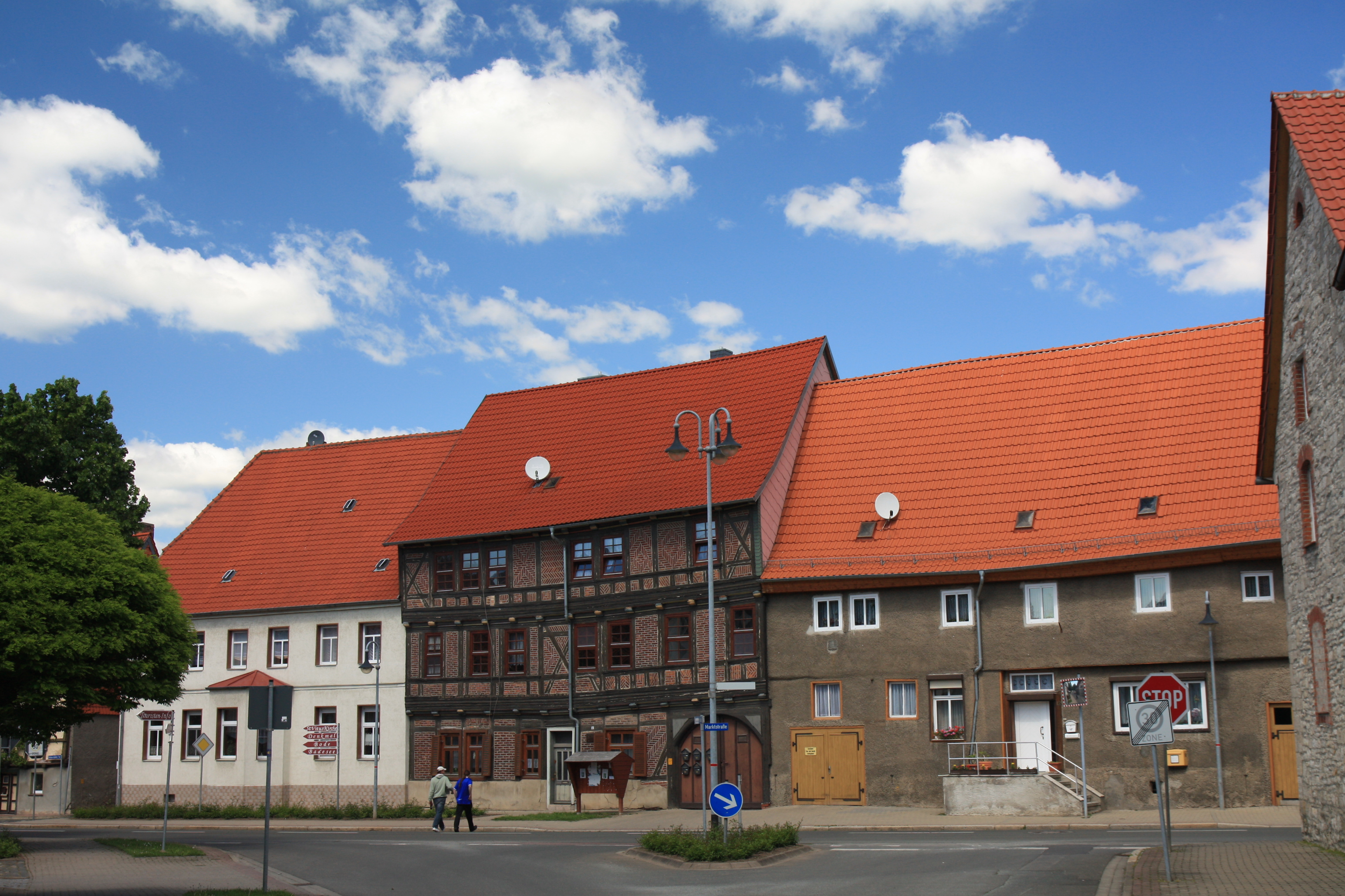 Das in der Bildmitte befindliche Fachwerkhaus wurde 1697 vom Amtsrichter Ortlepius erbaut.